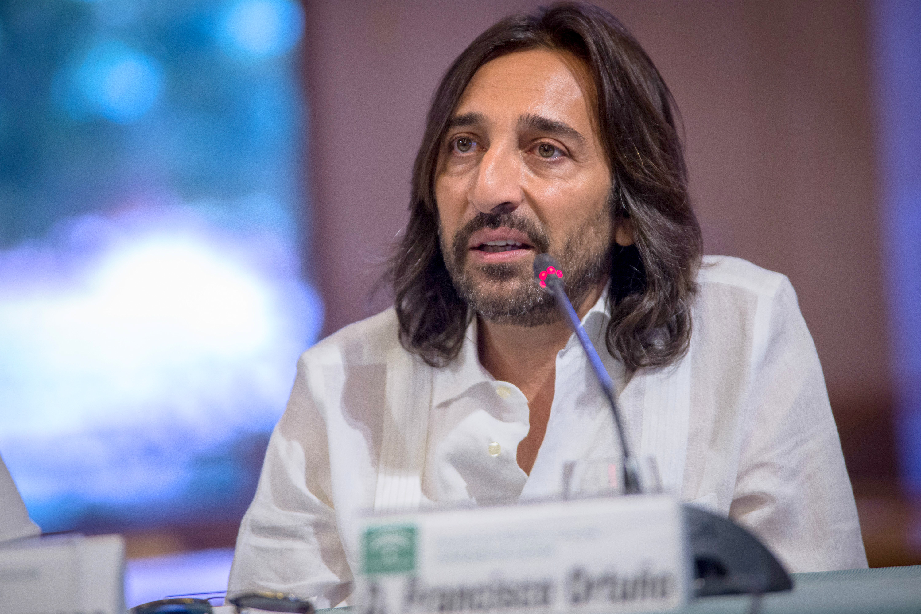 Antonio Carmona en 2017